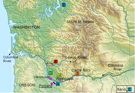 Thematische Karte zur Cooper-Flugzeugentführung